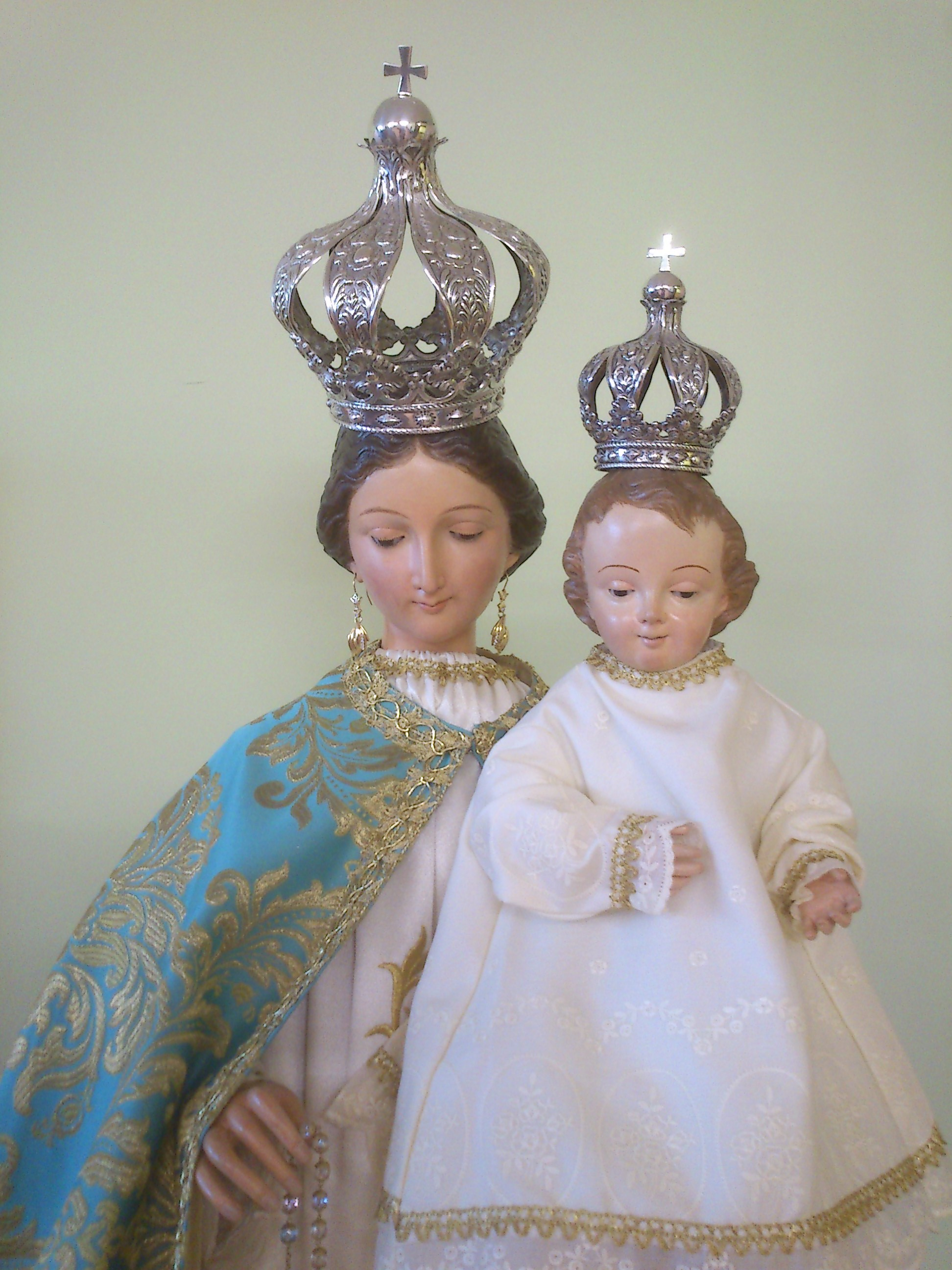 Nuestra Señora de Duero, imagen de la Virgen en la parroquia de Puente Duero (Valladolid).